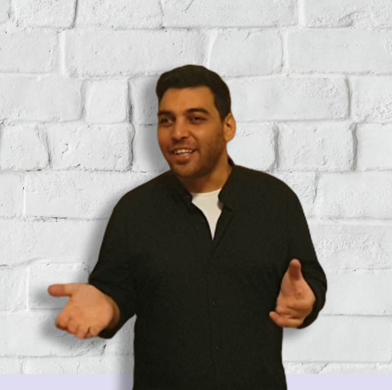 אלירן דיין